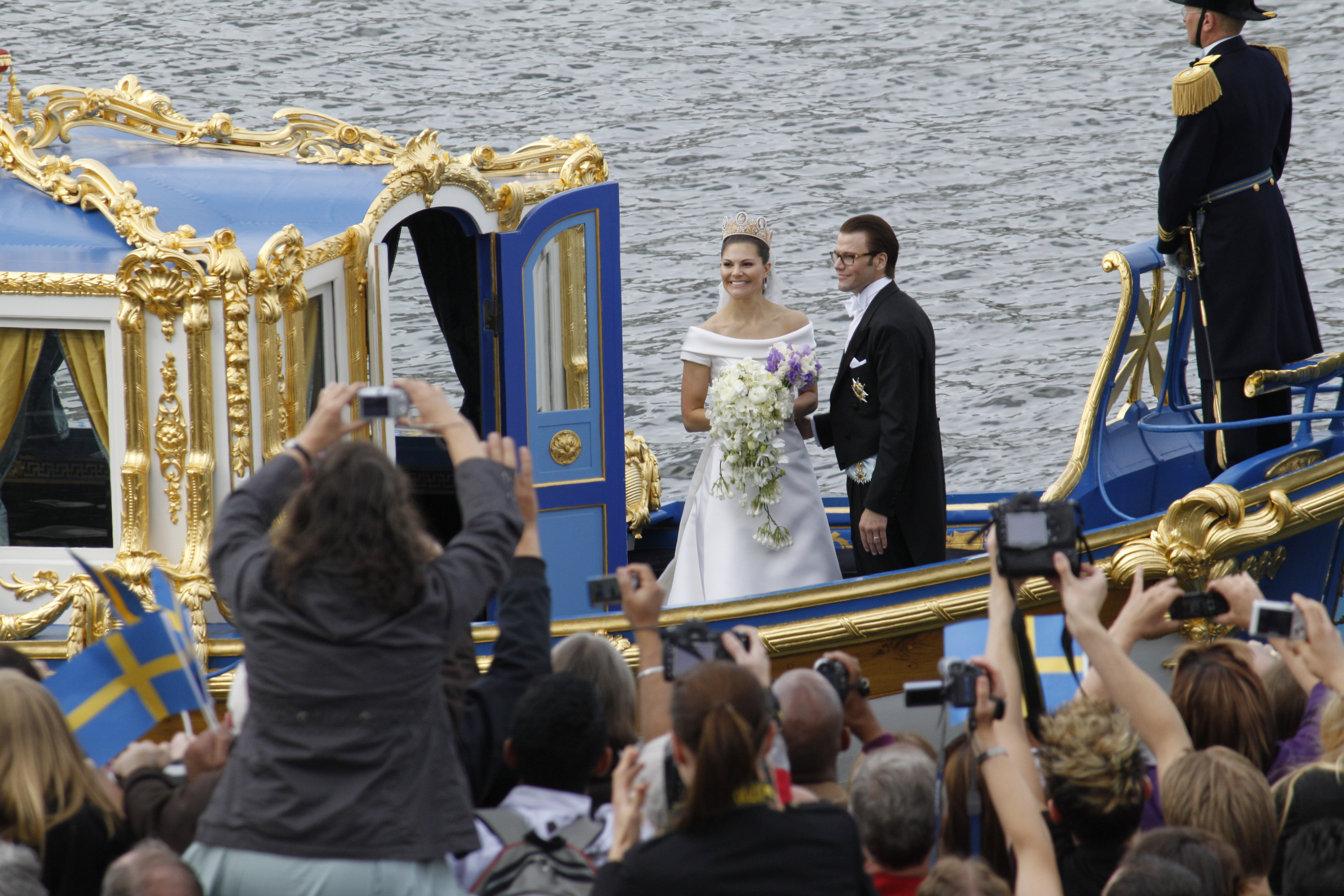 royal barge